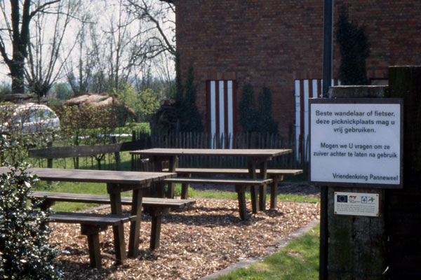 Foto van de vereniging Natuurpunt Waasland Noord, aan de vereniging toevertrouwd voor vrij gebruik en promotie.